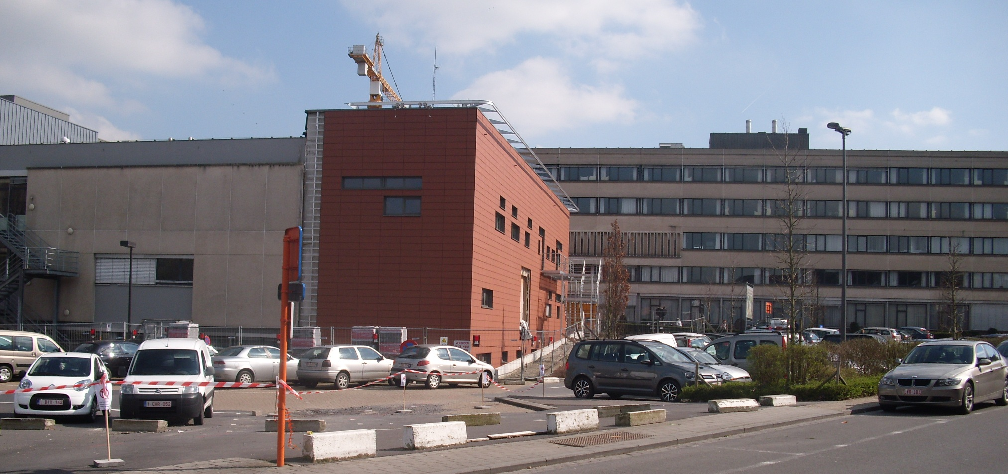 Sint-Andriesziekenhuis met een gedeelte van rond 1980 en links de nieuwbouw van 2011 - Krommewalstraat - Tielt - West-Vlaanderen - België